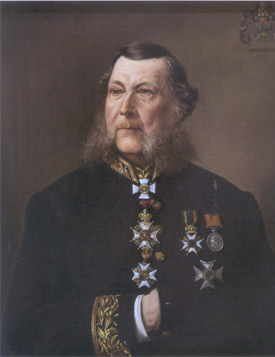 Portret van Jhr.Mr. E.J.C.M. de Kuijper in de periode 1874-1893. Uit Noord-Brabant afkomstige Commissaris van de Koning in Limburg. Was eerder burgemeester van Den Bosch. Zijn vader was burgemeester van Veghel en gedeputeerde van Brabant. Stond bekend als een eenvoudige, niet op uiterlijk vertoon beluste bestuurder, die minzaam in de omgang was. Overleed nog geen vier weken nadat hij was afgetreden als Commissaris.